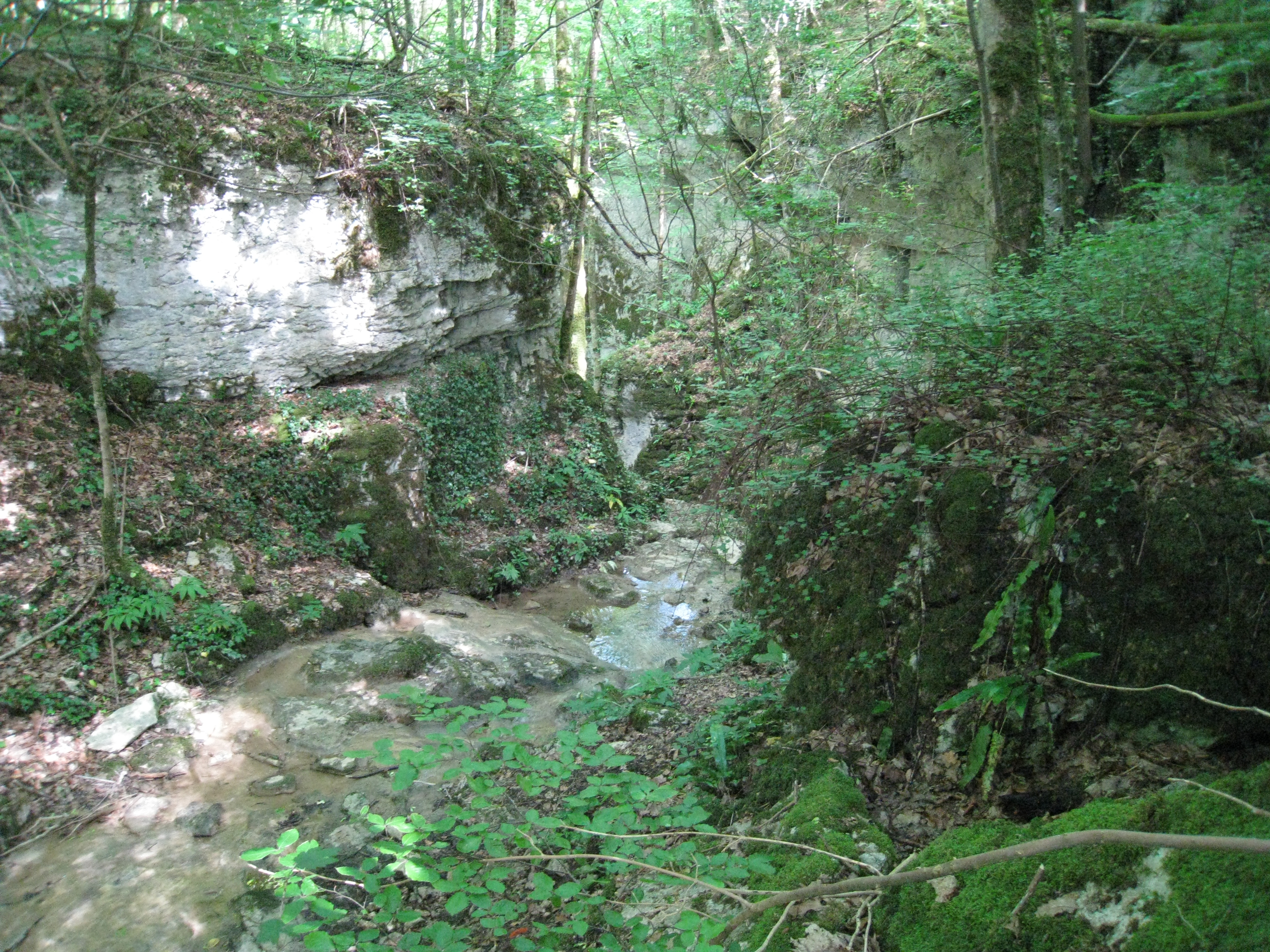 Les gorges de la Vingeanne, 52250 Aprey, département de la Haute-Marne, région Champagne-Ardennes, France